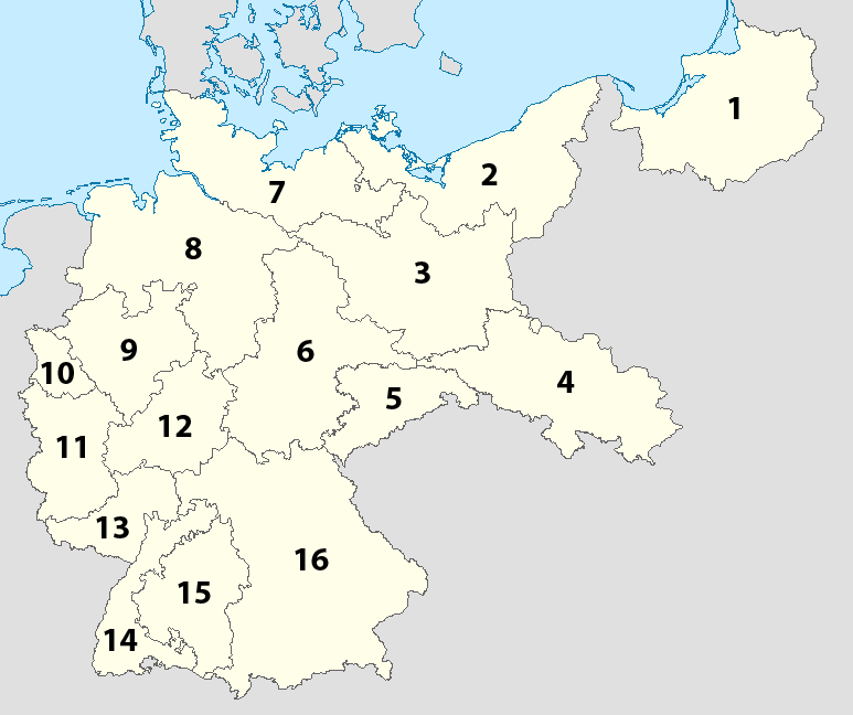 Karte der 16 Sportgaue im Dritten Reich 1933 1 Ostpreußen, 2 Pommern, 3 Berlin-Brandenburg, 4 Schlesien, 5 Sachsen, 6 Mitte, 7 Nordmark, 8 Niedersachsen, 9 Westfalen, 10 Niederrhein, 11 Mittelrhein, 12 Hessen, 13 Südwest, 14 Baden, 15 Württemberg, 16 Bayern